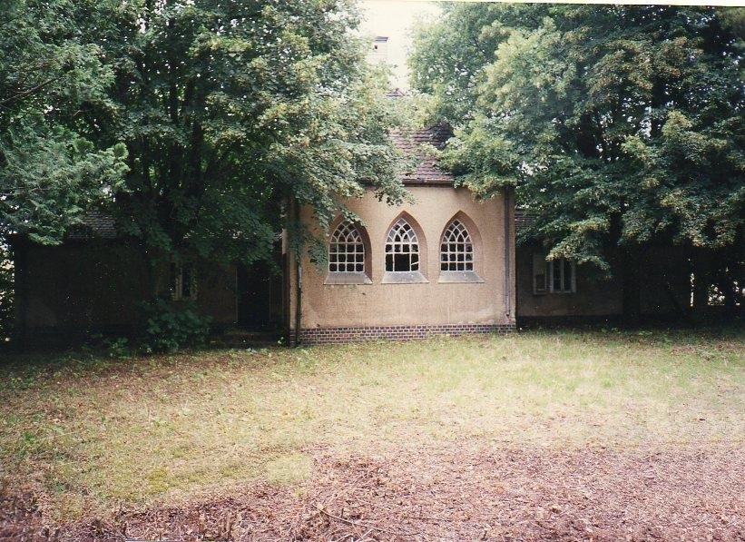 Friedhofskapelle auf dem eingeebneten Heimfriedhof an der Salzenforster Straße gegenüber Schmoler Weg in Bautzen-Seidau kurz vor dem Abriss 2000, Scan von einer Fotografie